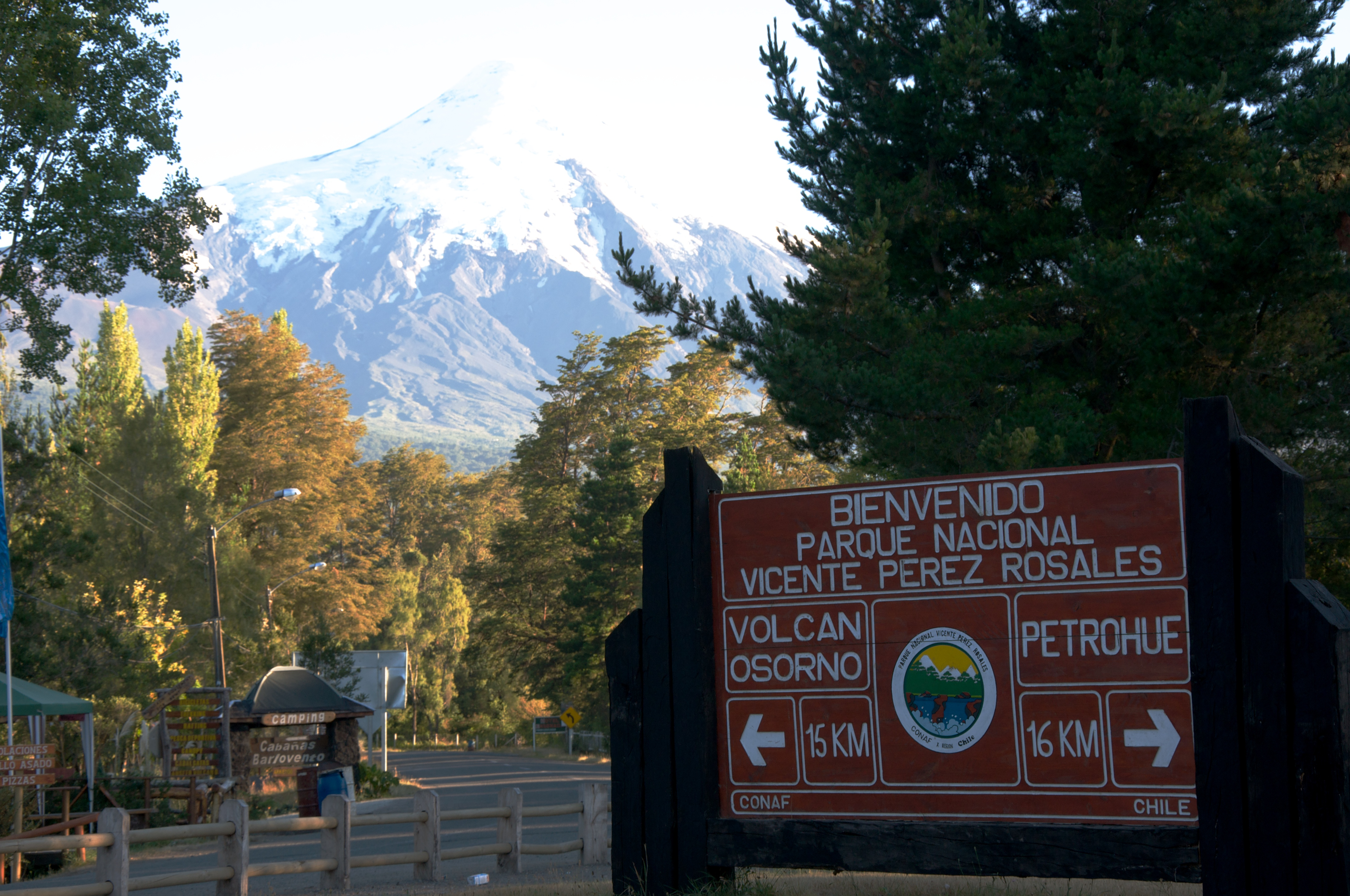 Bienvenido Parque Nacional Vicente Pérez Rosales